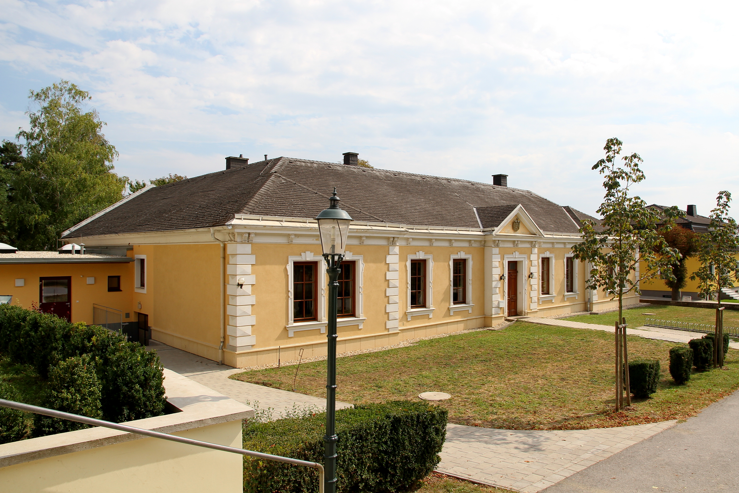 Der ehemalige katholische Pfarrhof der burgenländischen Gemeinde Halbturn.